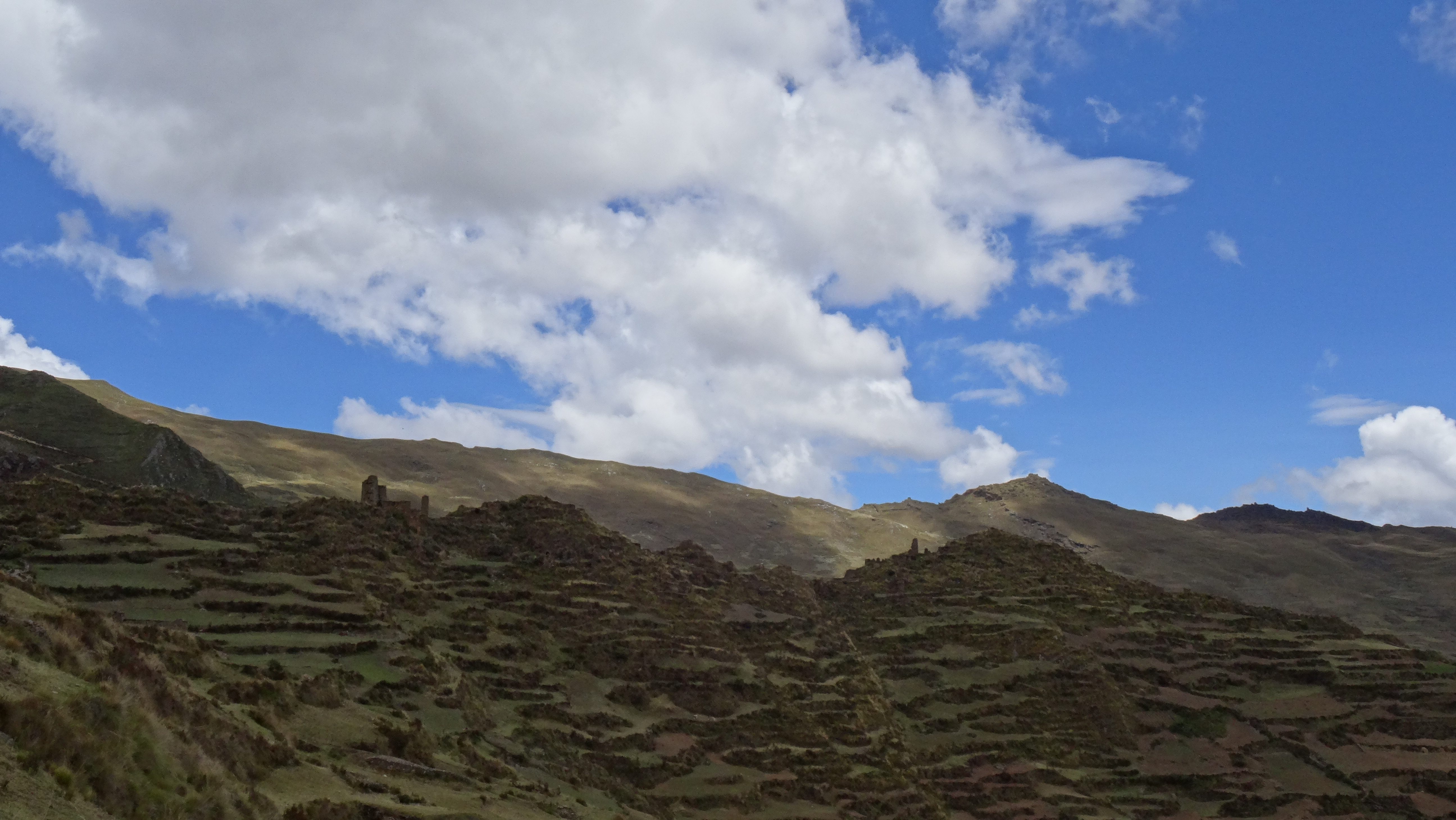 Vista de Huata desde el camino de herradura. Runa Simi: Wat´a